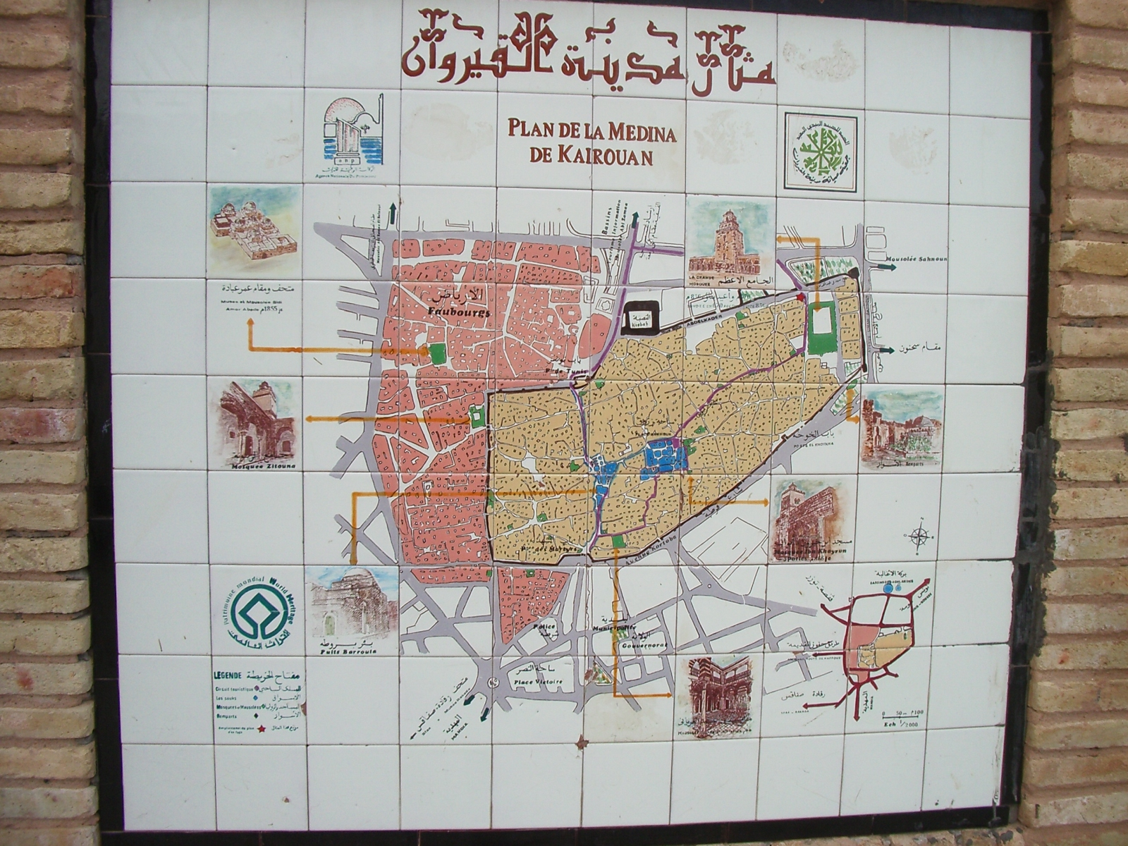 Planol de la Medina de Kairouan